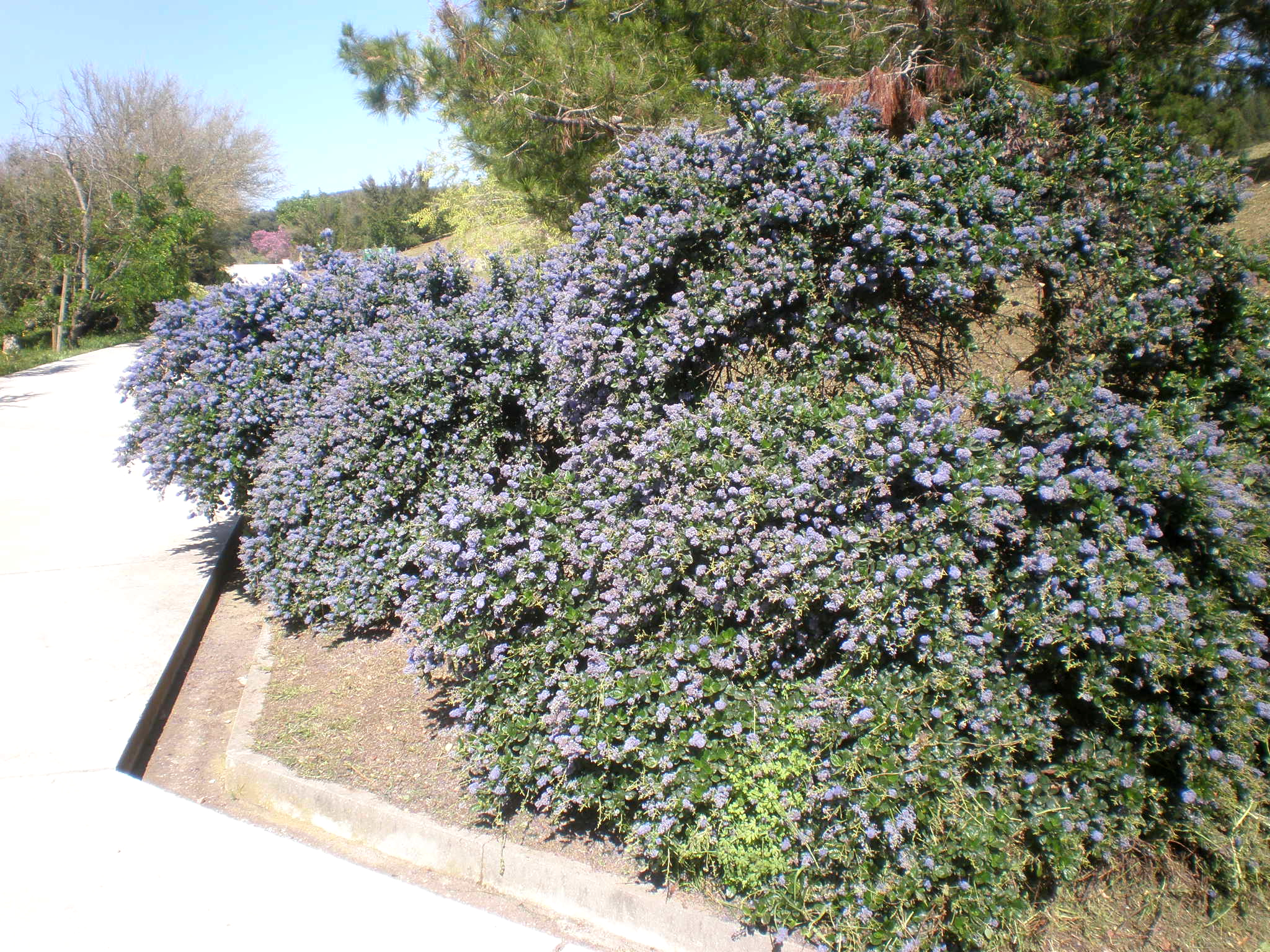 Jardín Botánico de Barcelona.